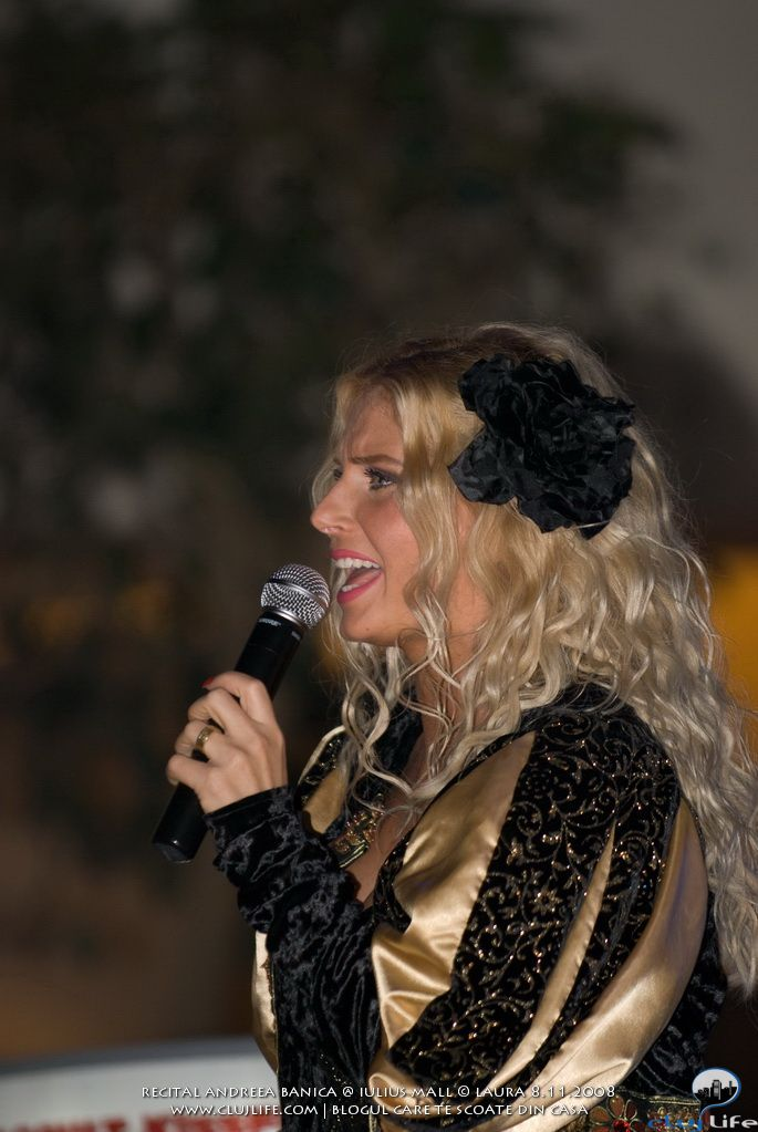 La cantante rumana Andreea Banica en un concierto en Cluj, 2008.